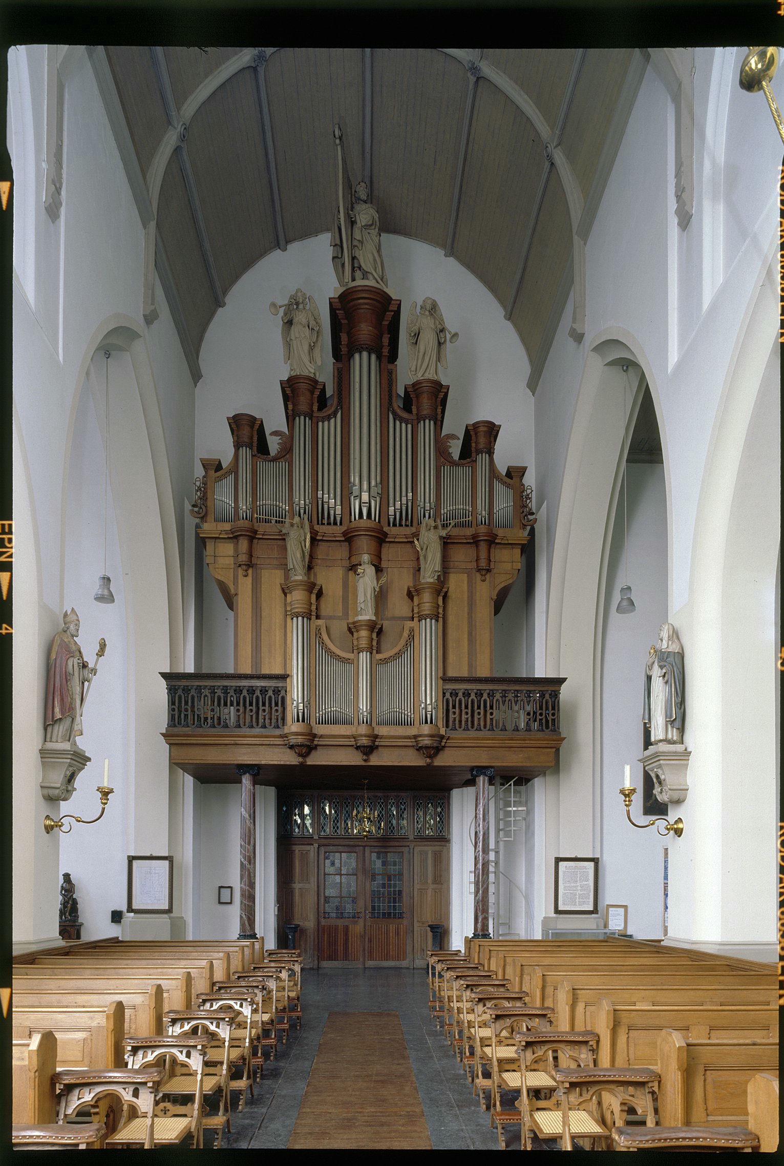 Sint Petrus Banden: Interieur, aanzicht orgel, orgelnummer 685 (opmerking: Gefotografeerd voor Het Historische Orgel in Nederland 1840-1849)